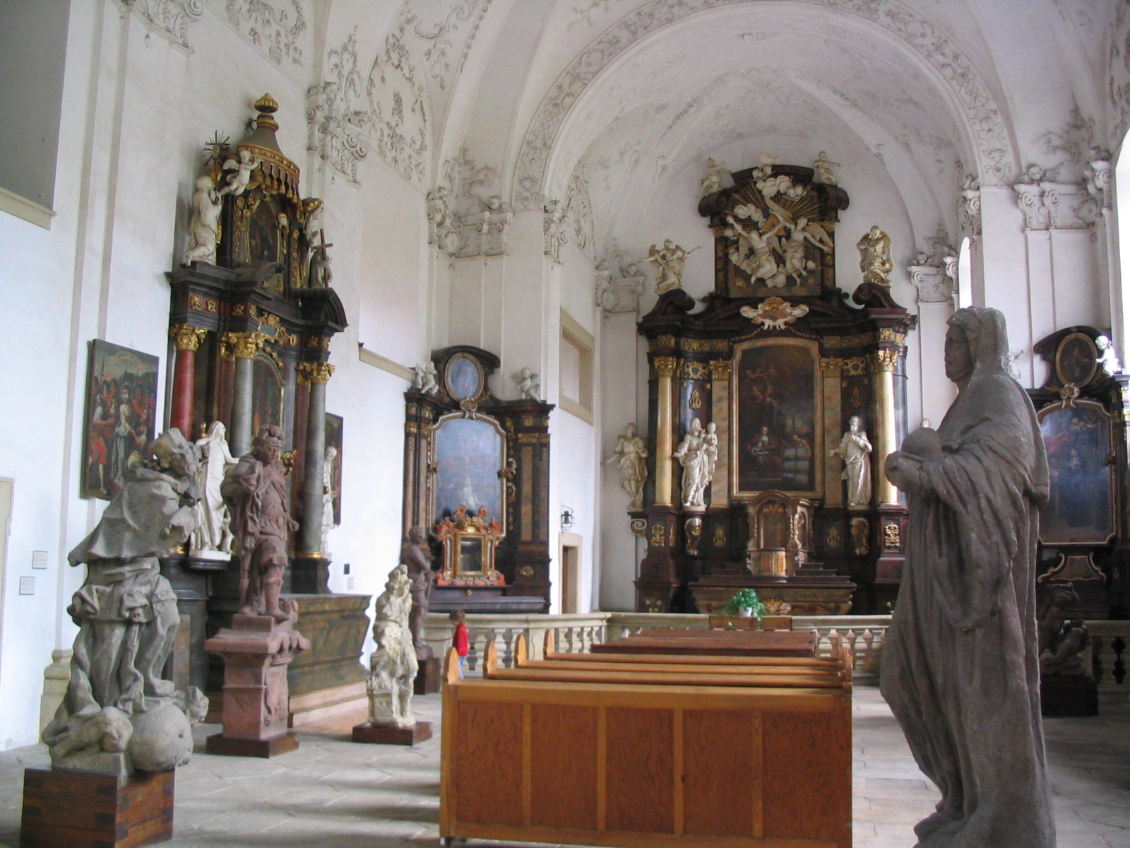 Castel of Mnichovo_Hradiště, czech republic